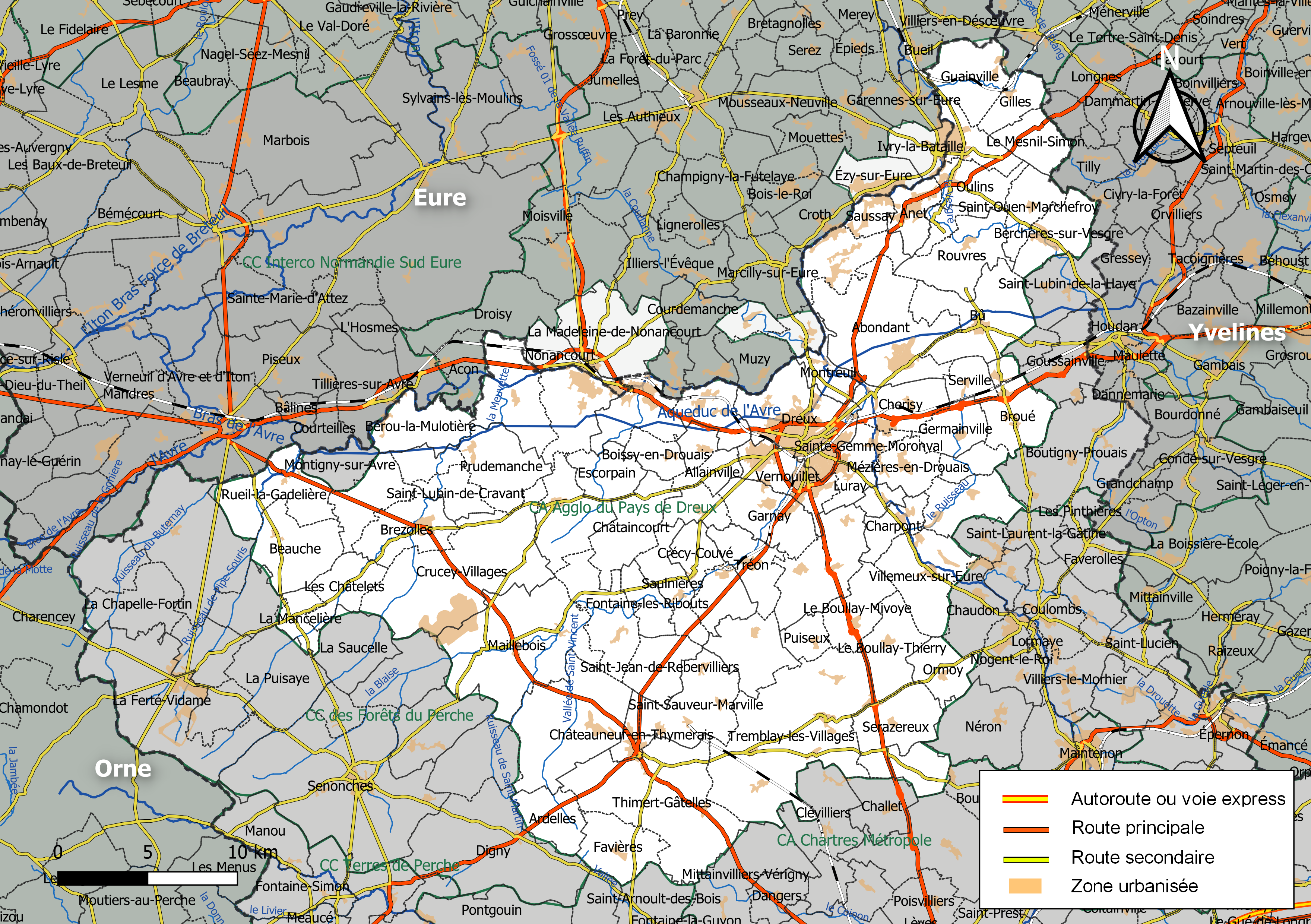 Carte géographique de la communauté d'agglomération du Pays de Dreux, département d'Eure-et-Loir, France. Composition au 1er janvier 2019.